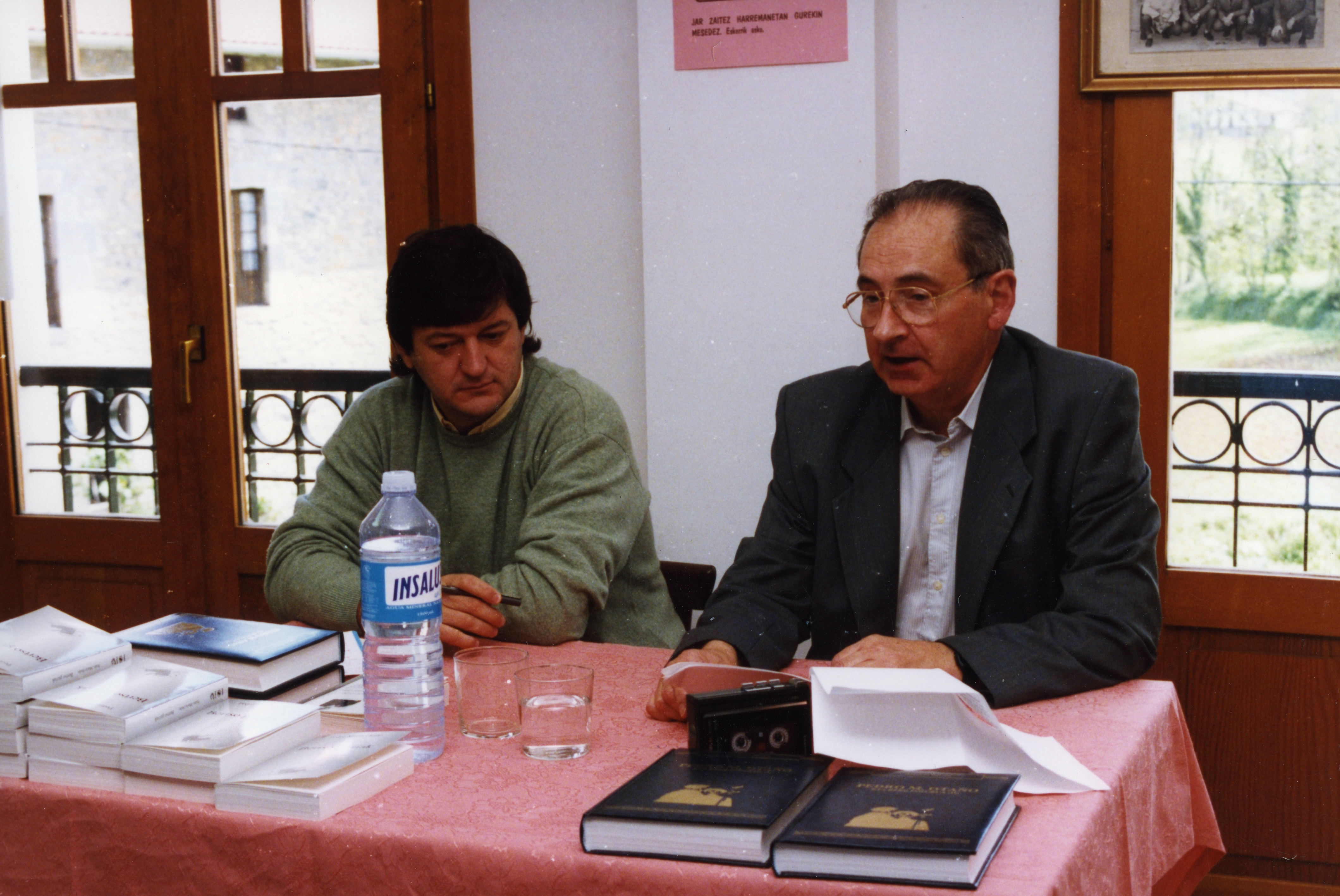 Pello Mari Otaño eta Teodoro Hernandorena bertsolariei omena.Mikel Arrastoa Zizurkilgo alkatea eta Antonio Zabala ikerlaria. Aiurri 2 zbk. 24. orr.